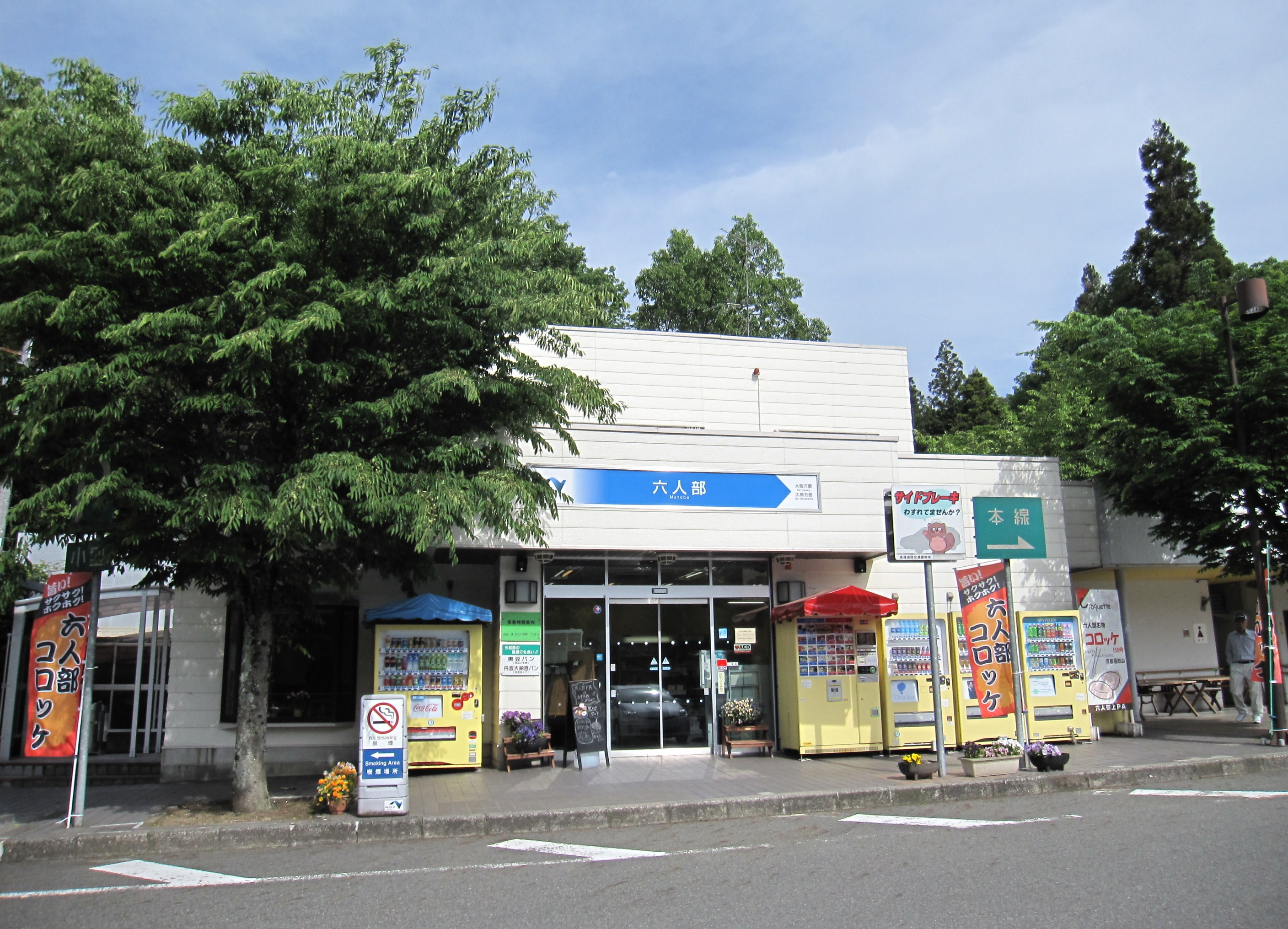 六人部パーキングエリア（上り線）